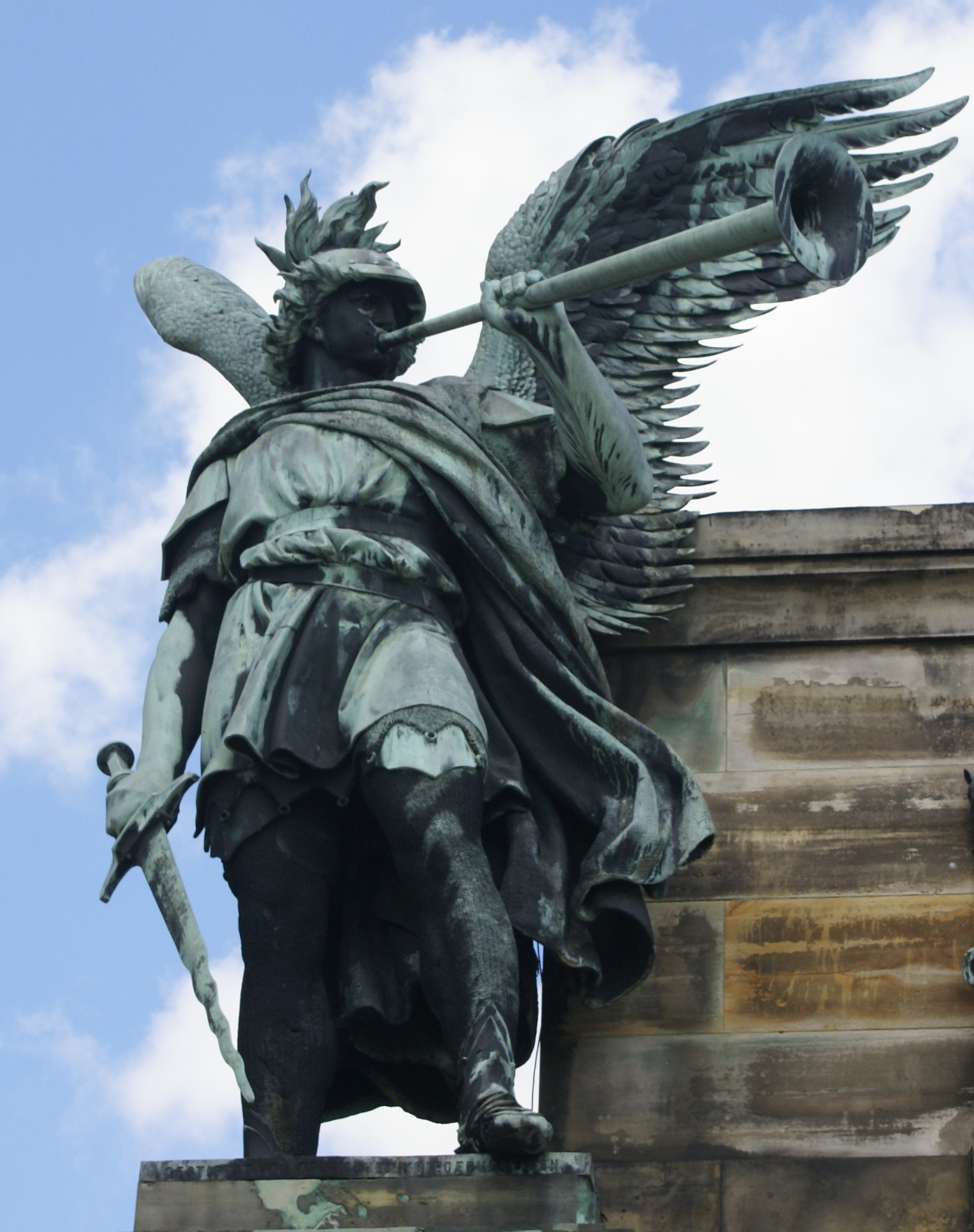 Niederwalddenkmal Rüdesheim: Die Figur des Krieges